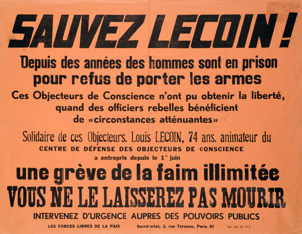 En juin 1962, à 74 ans, Louis Lecoin entame une grève de la faim qui dure vingt-deux jours pour obtenir un statut pour les objecteurs de conscience.